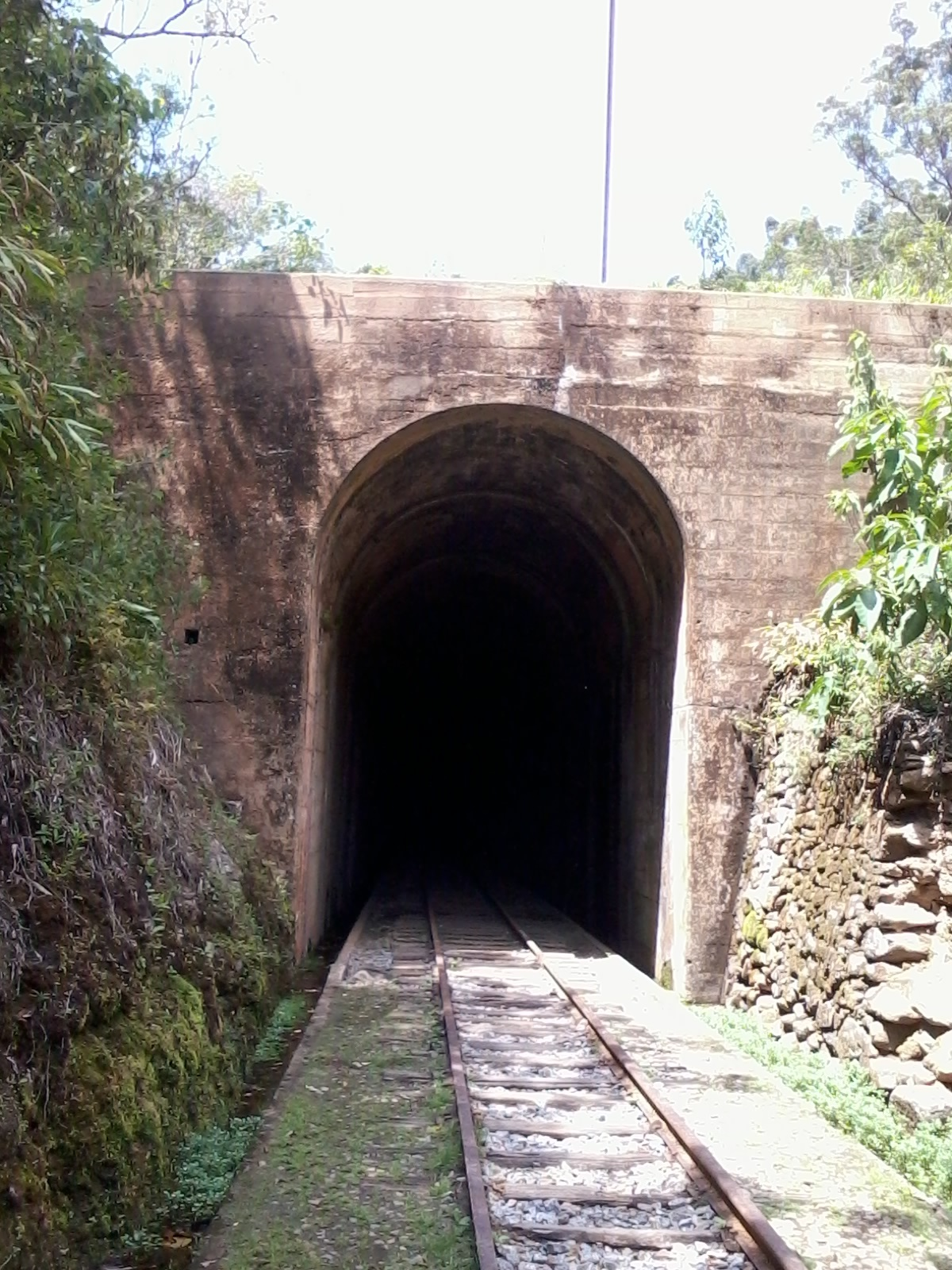 Boca mineira do túnel da Mantiqueira. O Grande Túnel possui 996m de comprimento e está localizado a uma altitude de aproximadamente 900m. Foi construído embaixo da Garganta do Embaú por determinação do Imperador Dom Pedro II , no ano de 1882, e inaugurado em 5 de março de 1883.